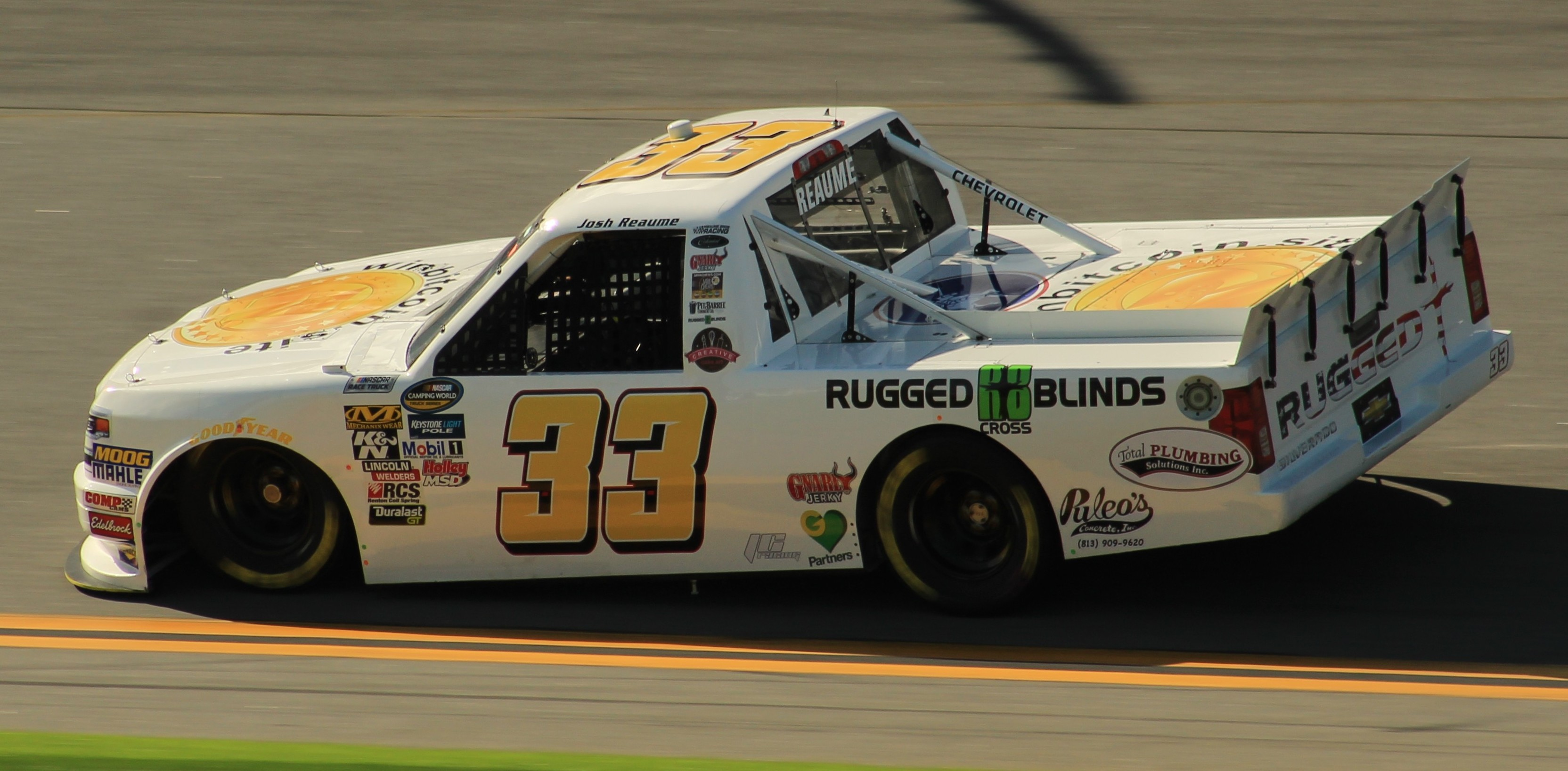 2018 Daytona 500